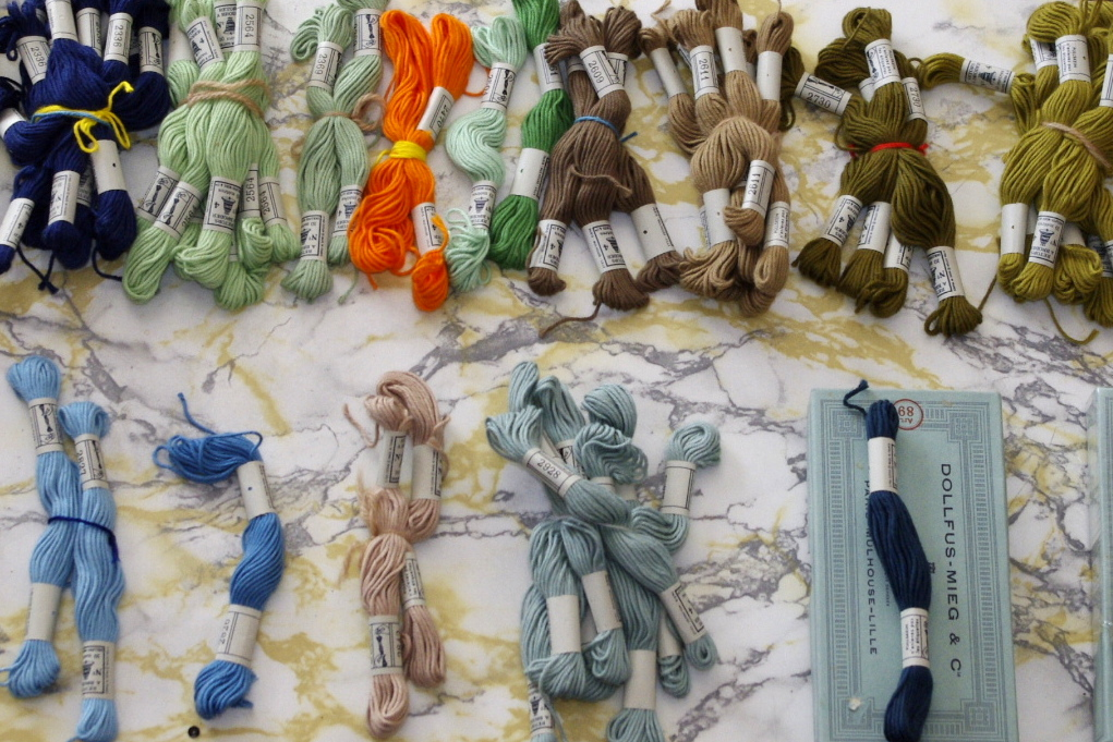 Stickgarn